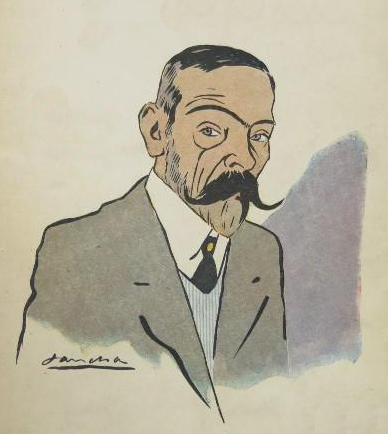 Retrato de Teodoro Gascón.